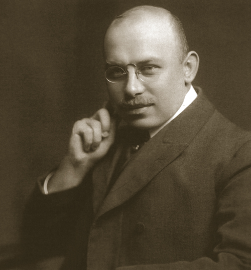 El arquitecto Jan Letzel vestido al modo occidental